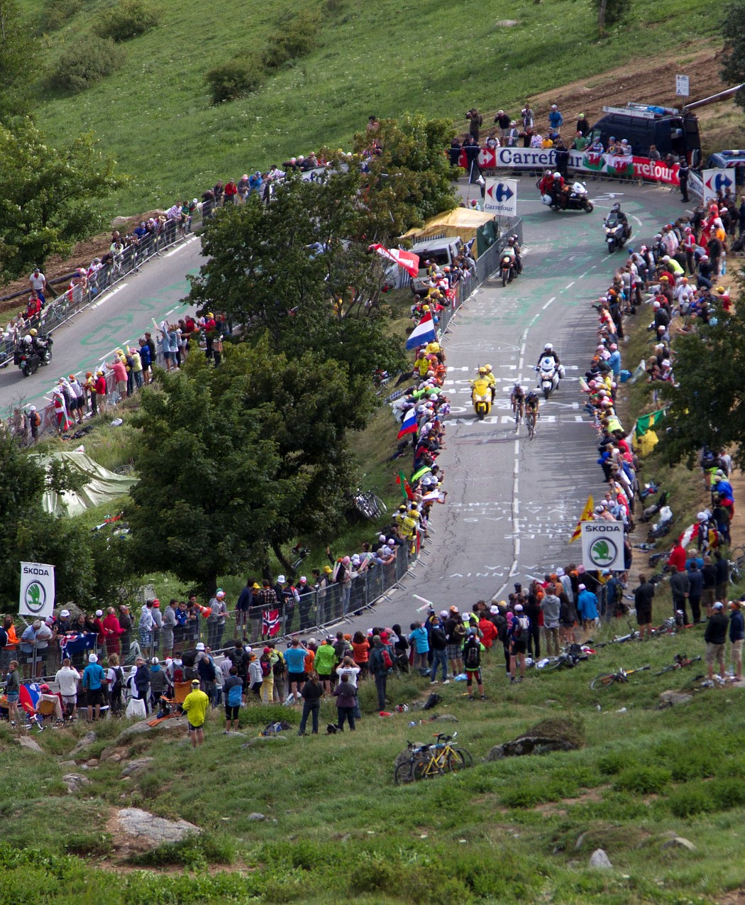 alpedhuez 053 de gendt en velits in bocht 3